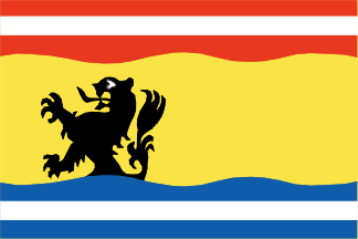 Vlag van Zeeuws-Vlaanderen